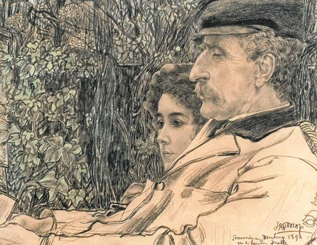 Jan Toorop - Dubbelportret van Johan Drabbe (1839-1916) en zijn dochter Mies Elout Drabbe (1875-1956), 1898 gedateerd